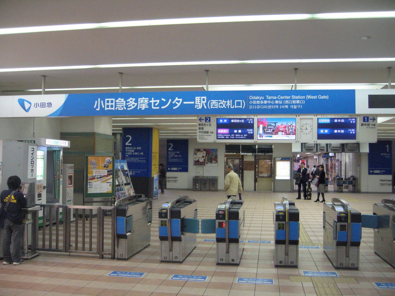 東京都多摩市の小田急多摩線小田急多摩センター駅西口を2010年10月31日撮影。